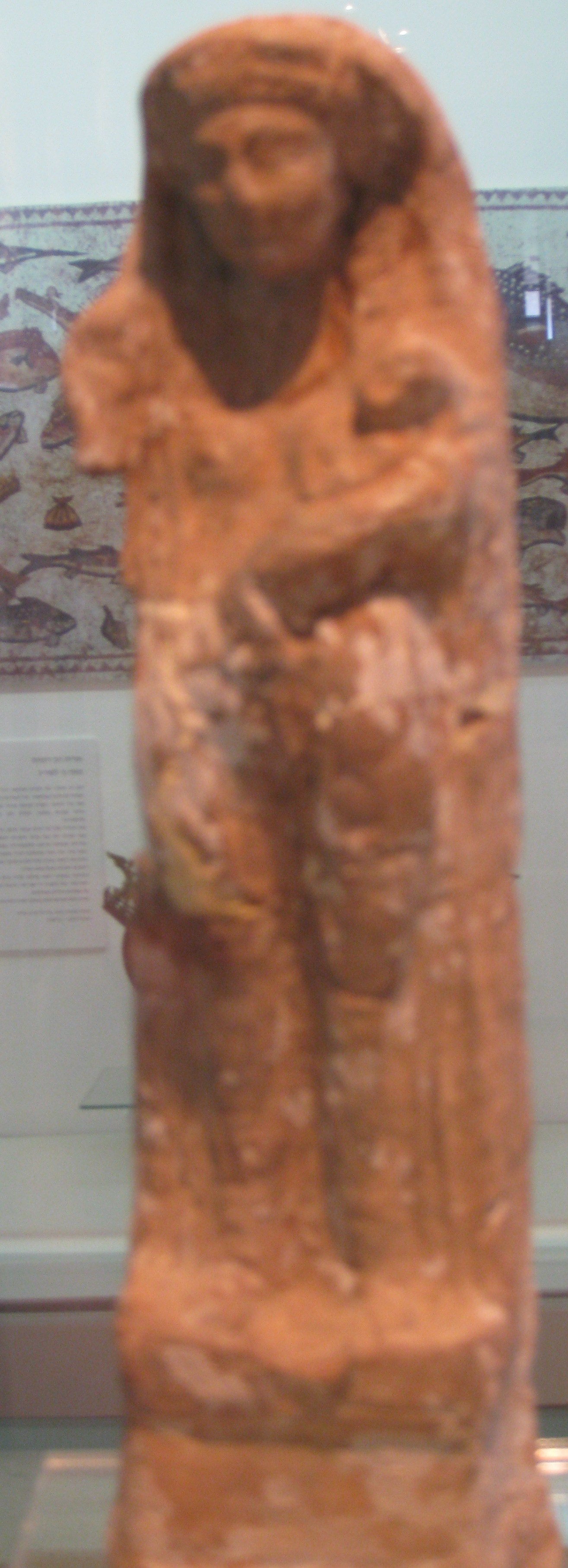 National Maritime Museum, Israel - Terracotta Figurines המוזיאון הימי הלאומי בחיפה צלמית של האלה פניקית-פונית תנית מחרס מהתקופה הפרסית מאה שישית-חמישי לפנה"ס. נמשה מהים